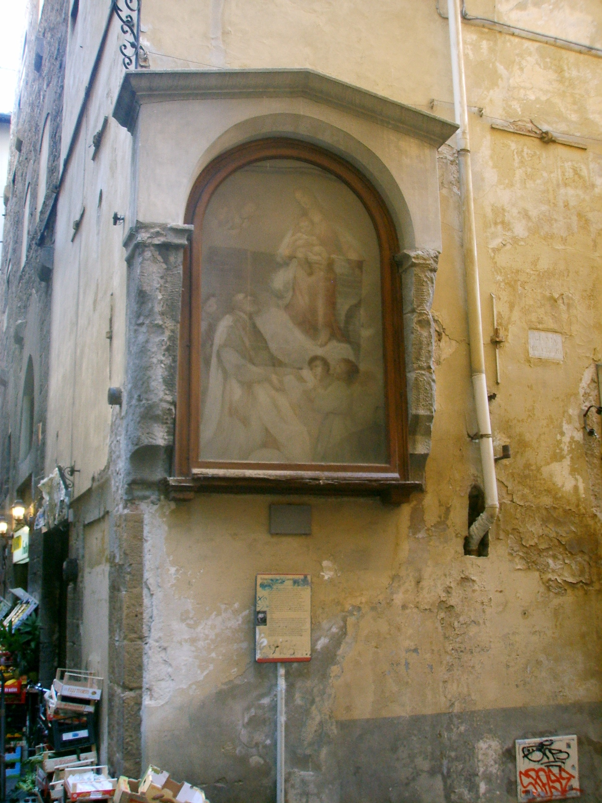 Tabernacolo_della_Quarquonia in Florence, italy